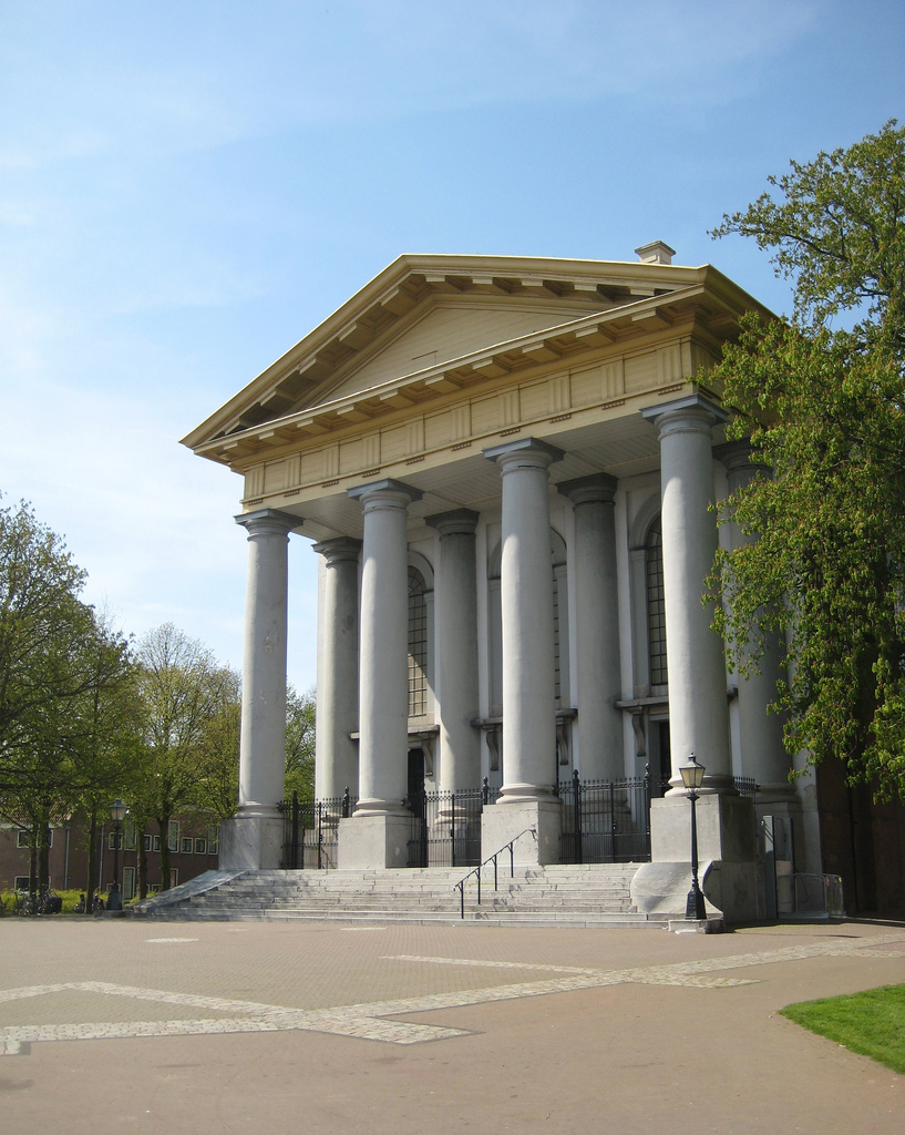 40634 Nieuwe kerk Zierikzee